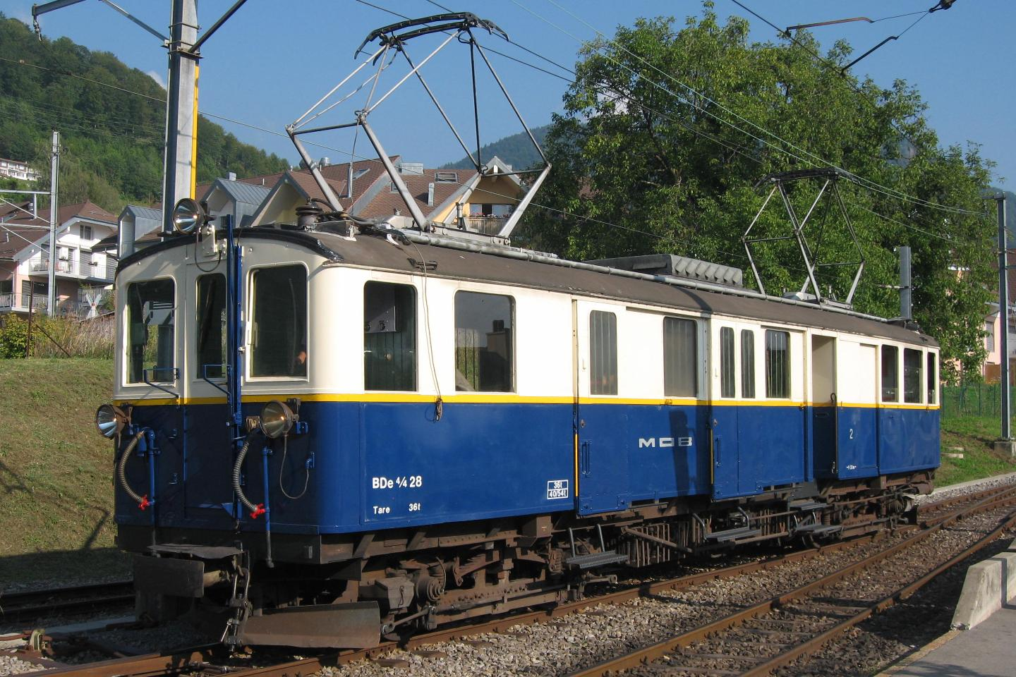 Deitsch: Gepäcktriebwagen De 4/4 28, ursprünglich CFZe 4/4 28, der Montreux-Berner Oberland-Bahn (MOB) in Blonay im Sommer 2012.